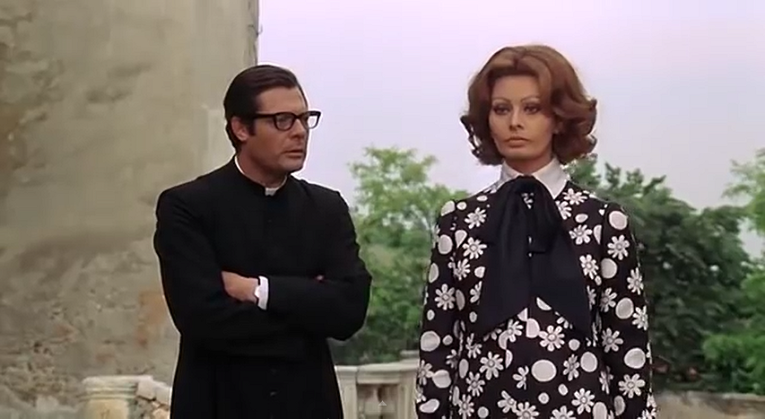 La moglie del prete, film del 1970 diretto da Dino Risi.